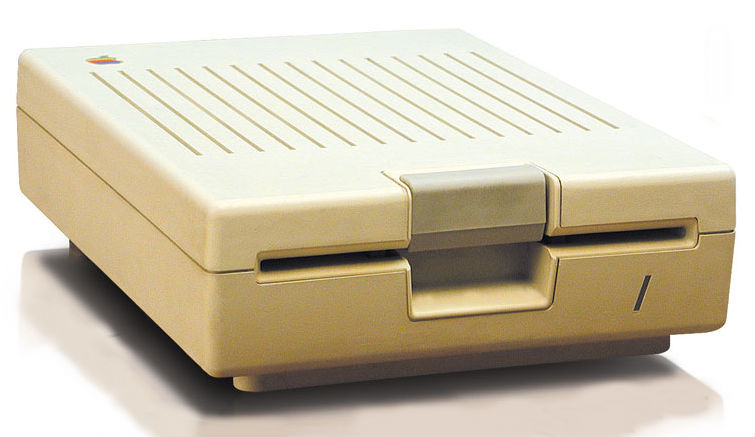 Disk iic